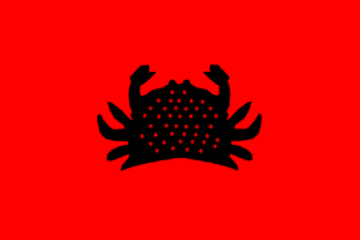 Unió dels Pobles de Camerun UPC